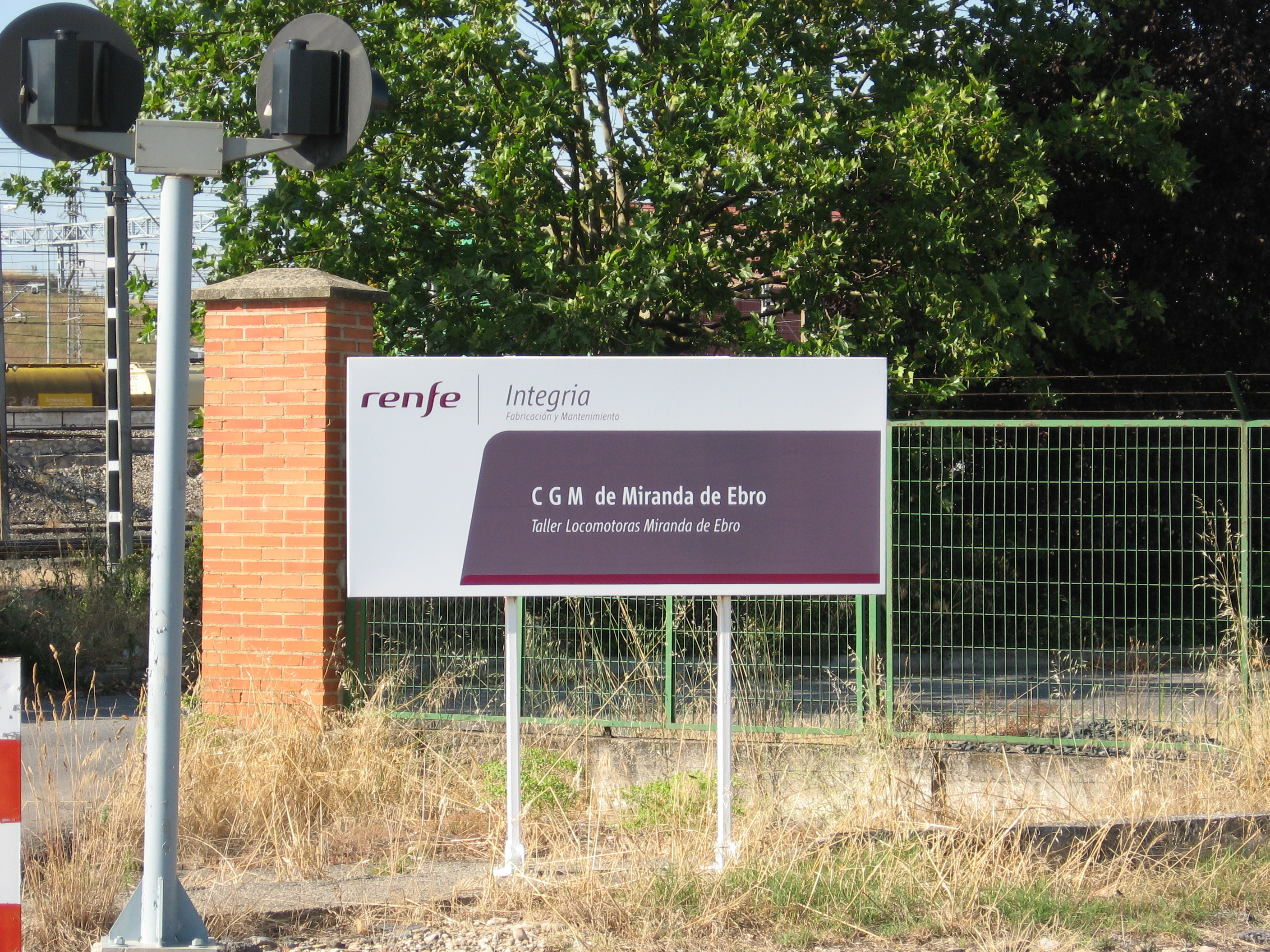 Desc: Cartel de entrada a los talleres de Renfe Integria en Miranda de Ebro